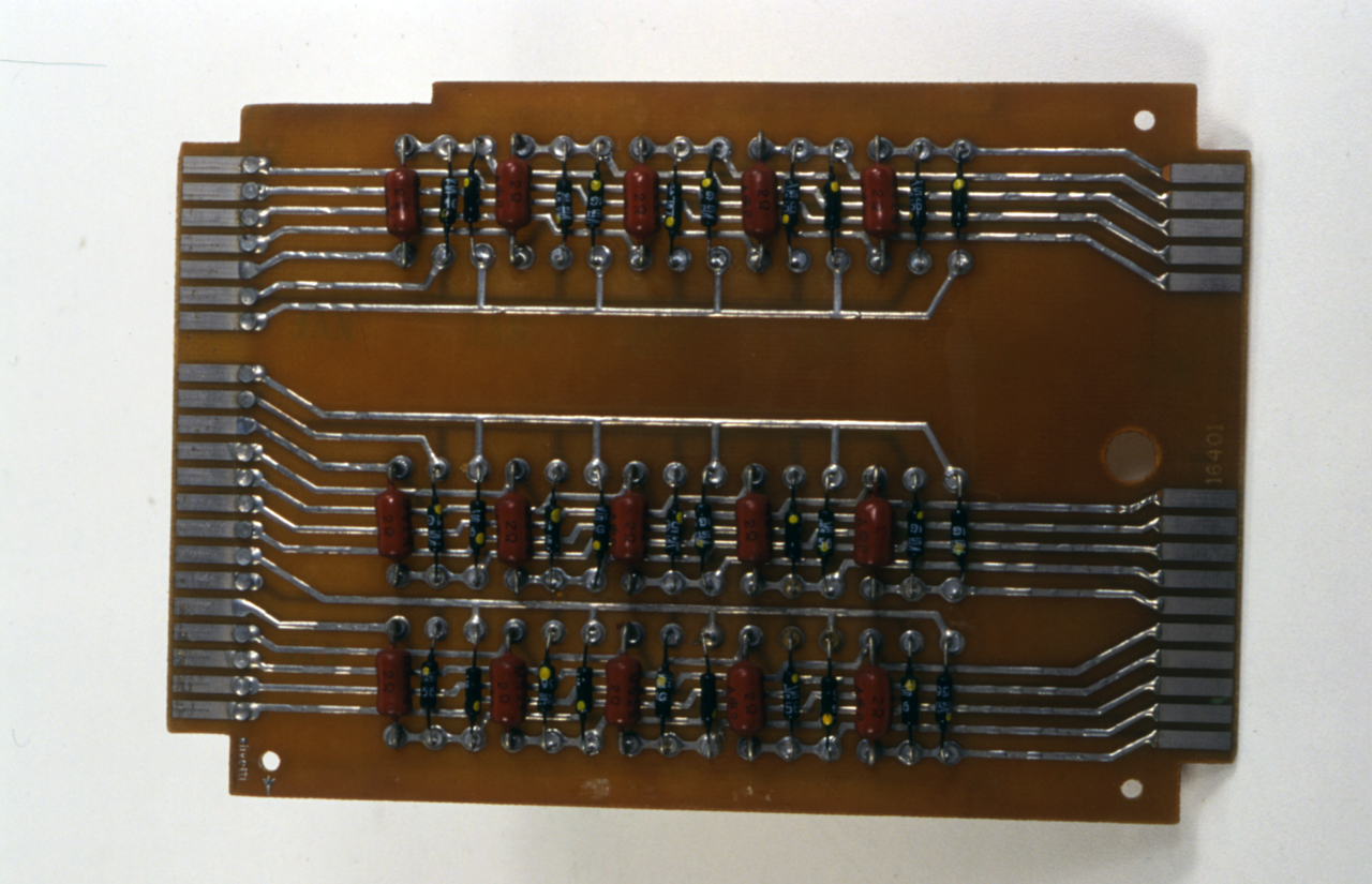 L'oggetto è costitutito da una piastra di bachelite sulla quale è presente un circuito stampato a doppio strato Su di essa sono installati componenti elettronici: 15 resistori e 30 diodi,Il circuito stampato termina sui due lati corti della scheda sagomati per l'alloggiamanto nei connettori di collegamento alle altre parti del sistema. Modalità d'uso L'utilizzo avviene all'interno del Sistema Olivetti ELEA 9009 per la gestione della memoria. Notizie storico-critiche A partire dal 1956 il Laboratorio Ricerche Elettroniche Olivetti, progetta un calcolatore (di grandi dimensioni per l'epoca) prima in una versione a valvole, poi in una seconda versione a transistor, che prende il nome di Elea 9003. (Elaboratore Elettronico Aritmetico)Questo calcolatore, una delle prime macchine non prototipali completamente transistorizzate realizzate al mondo, è prodotto a partire dal 1959 in alcune decine di esemplari e installato presso importanti aziende in Italia L'Elea 9003 è dotato di una memoria a nuclei di ferrite, con memorie di massa a nastro magnetico. Il supporto a nastro magnetico può anche essere utilizzato per l'input dei dati previa una conversione fuori linea da schede perforate o da nastro perforato L'Elea 9009 venne prodotto nello stesso anno del 9003 Successivamente Olivetti realizza l'Elea 6001, pensato per le applicazioni di calcolo scientifico, ma poi utilizzato come elaboratore gestionale, commercializzato a partire dal 1962 e installato in numerosi esemplari L'Elea 6001 è anch'esso completamente transistorizzato e dotato di una memoria a nuclei di ferrite indirizzabile al singolo carattere. La memoria di massa è ancora a nastro magnetico. L'input per le applicazioni scientifiche è usualmente il nastro perforato, mentre per le applicazioni gestionali si utilizza un lettore di schede.